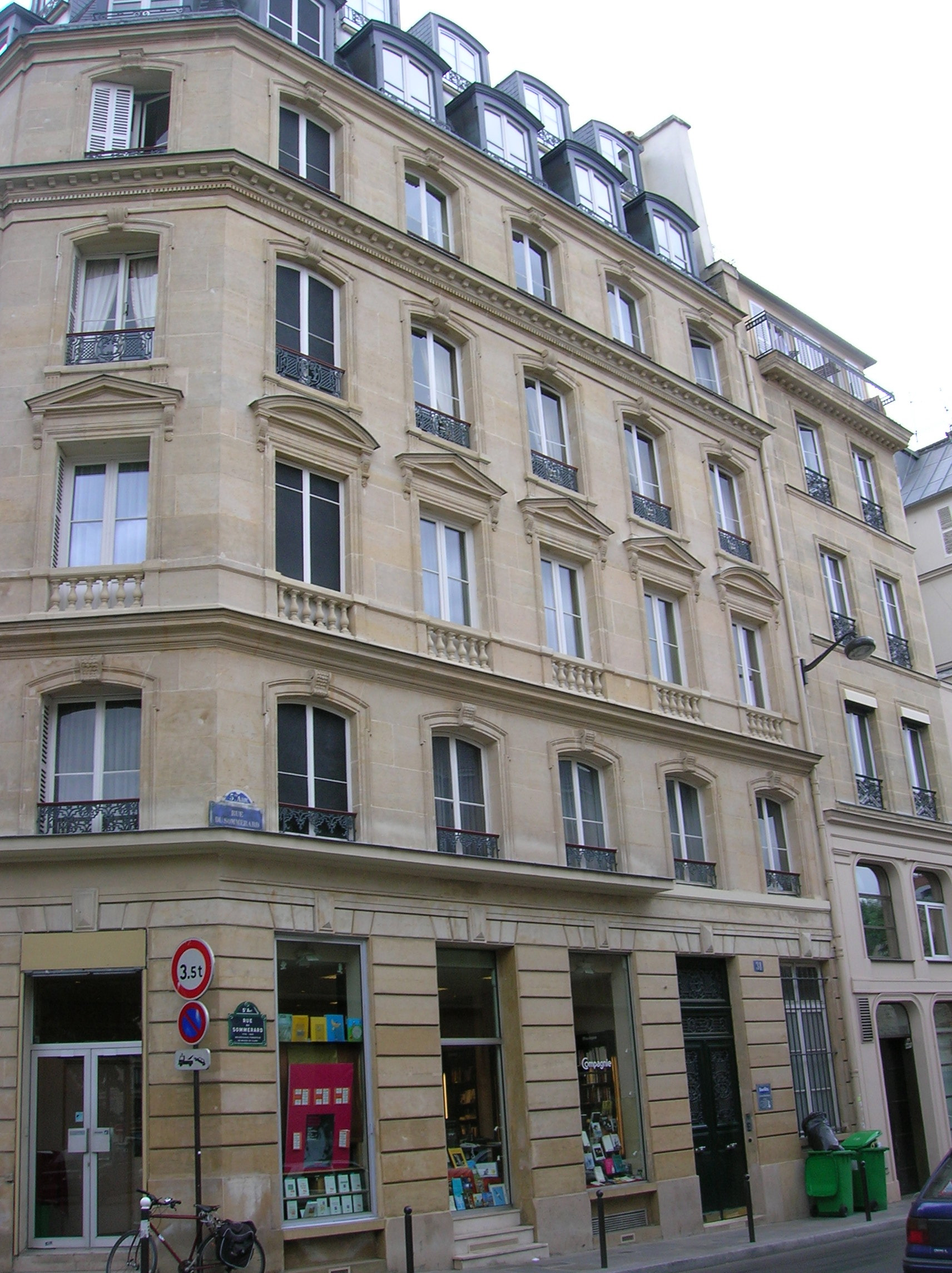 La rue Du Sommerard à Paris